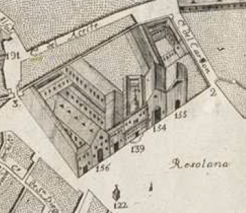 Detalle del plano de Sevilla de 1771 (conocido como "plano de Olavide") que muestra las antiguas Atarazanas. Clave de los números del plano: 156: La Maestranza Real de Artillería 139: Hospital de la Caridad 154: Real Aduana 155: Almacén de Lanas